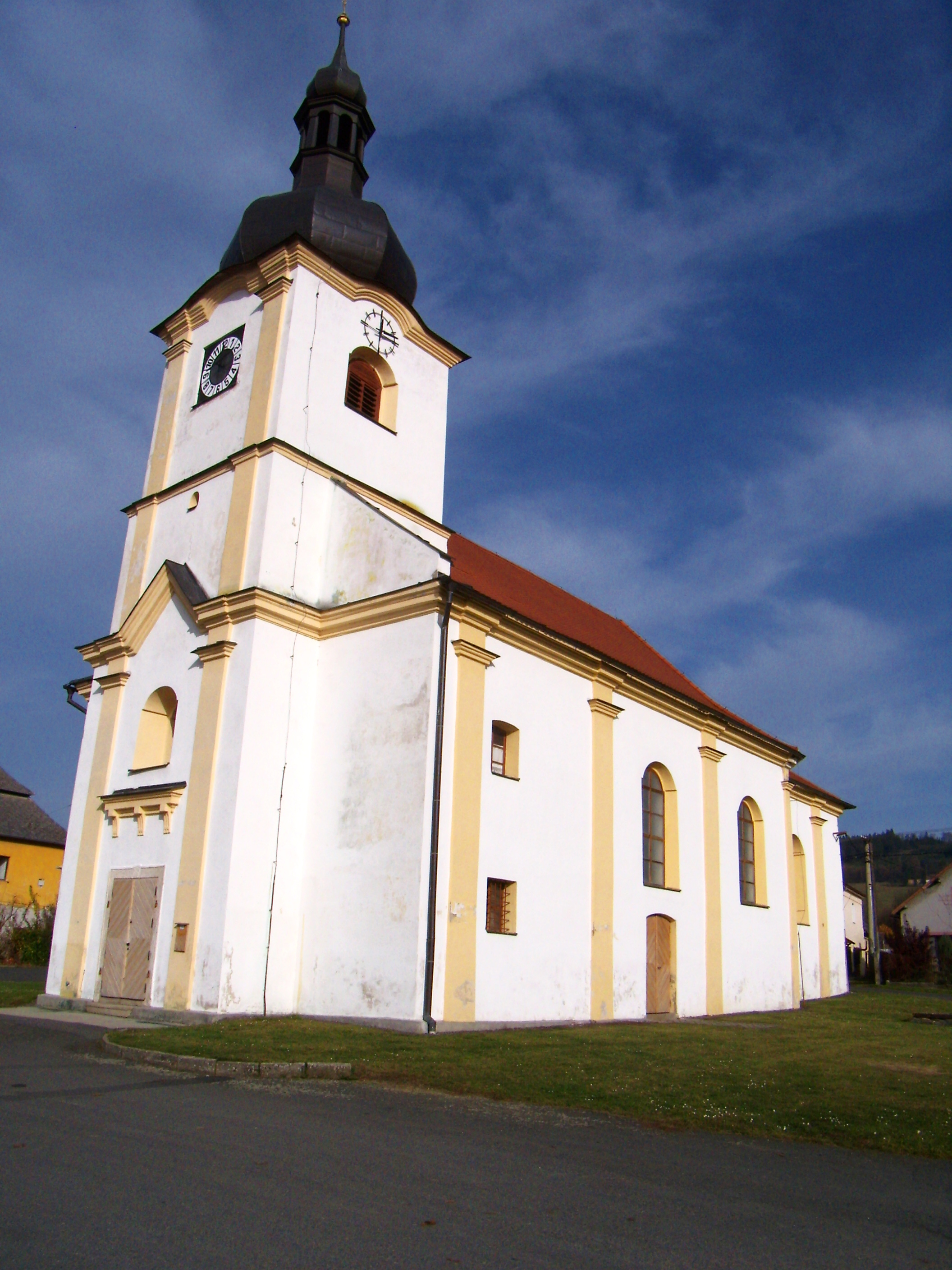 Pocinovice - kostel svaté Anny